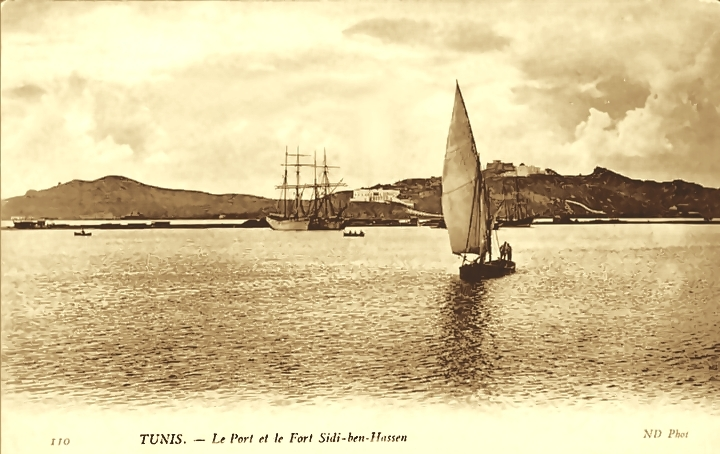 Lac de Tunis et le mausolée Sidi Belahassen Chedly